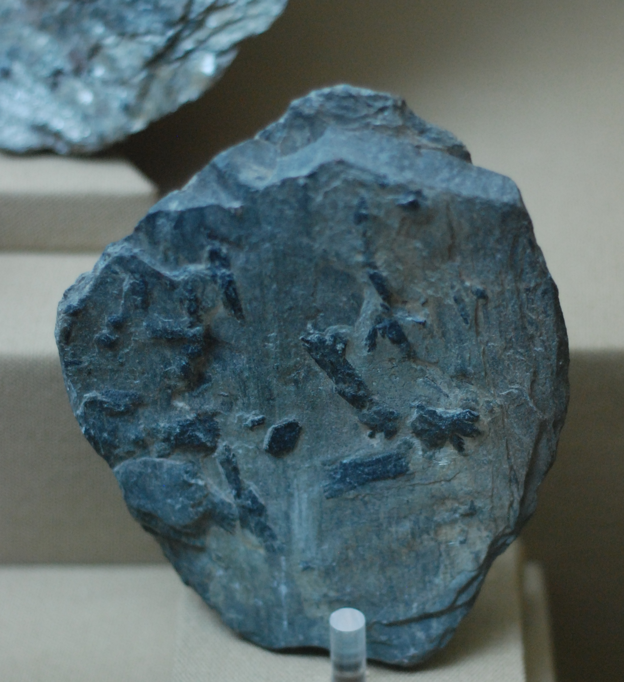 Esquiito con haces de estaurolita. Roca metamórifica. Sierra de Famatina, La Rioja, Argentina.